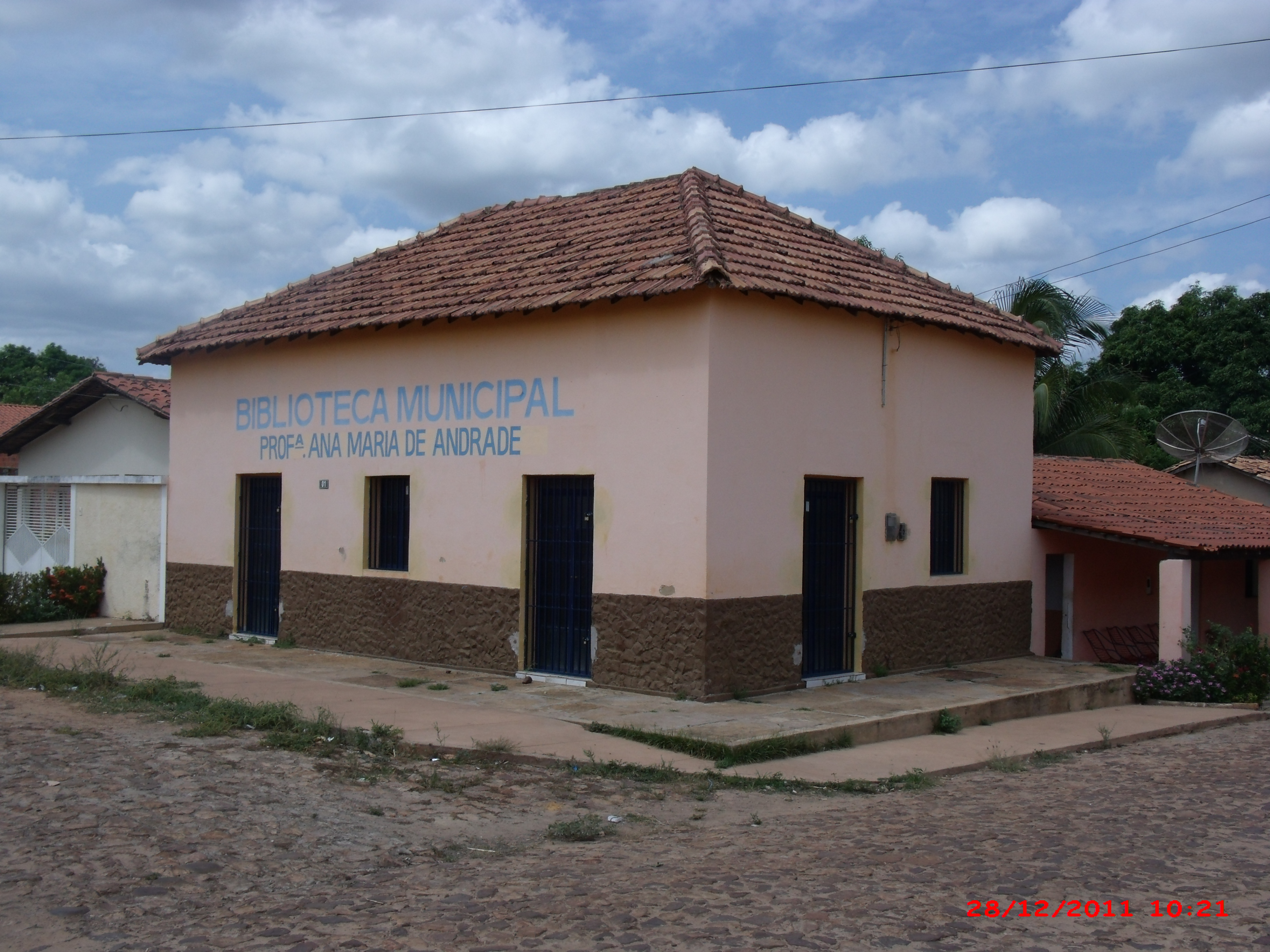 Imagem da Biblioteca Pública Municipal de Capitão de Campos, Piauí.